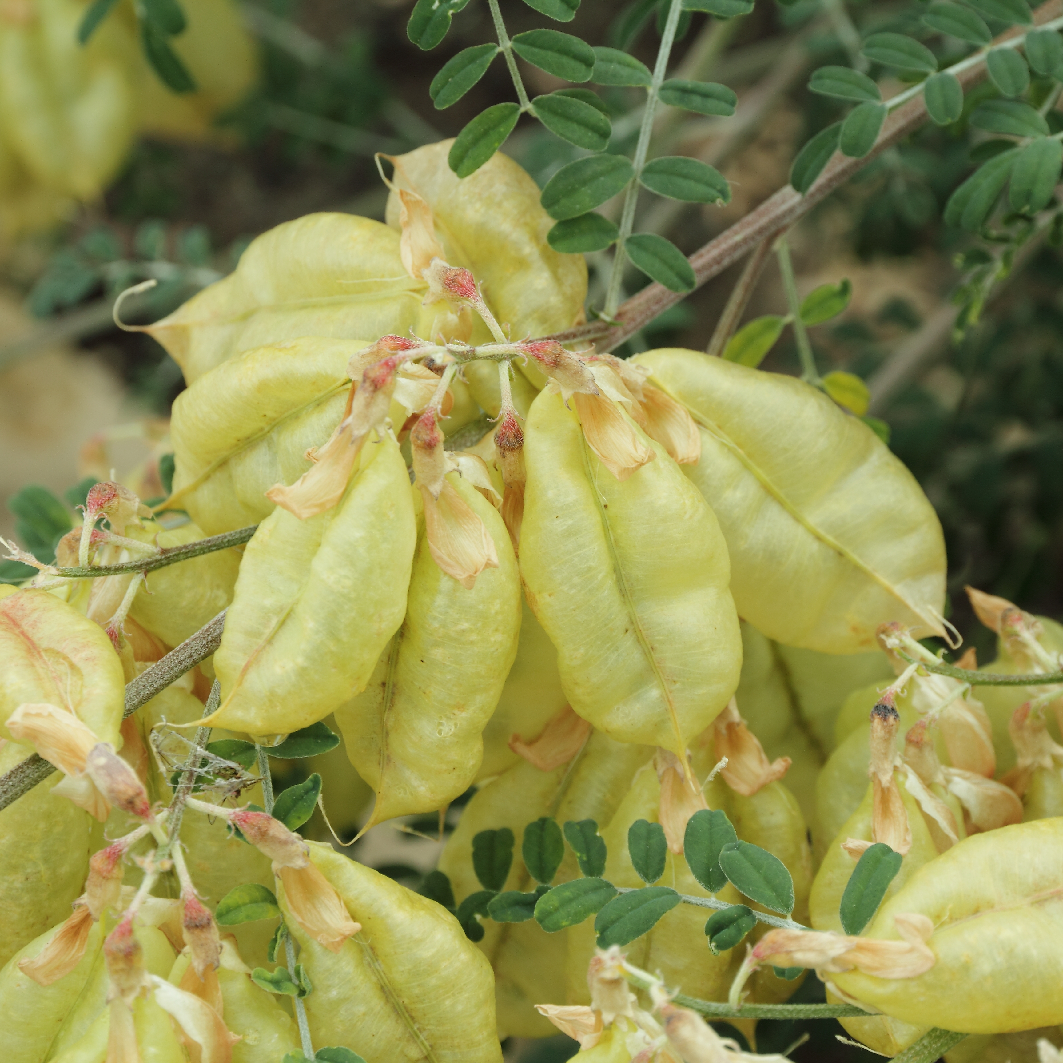 Sutherlandia frutescens i Bergianska trädgården.